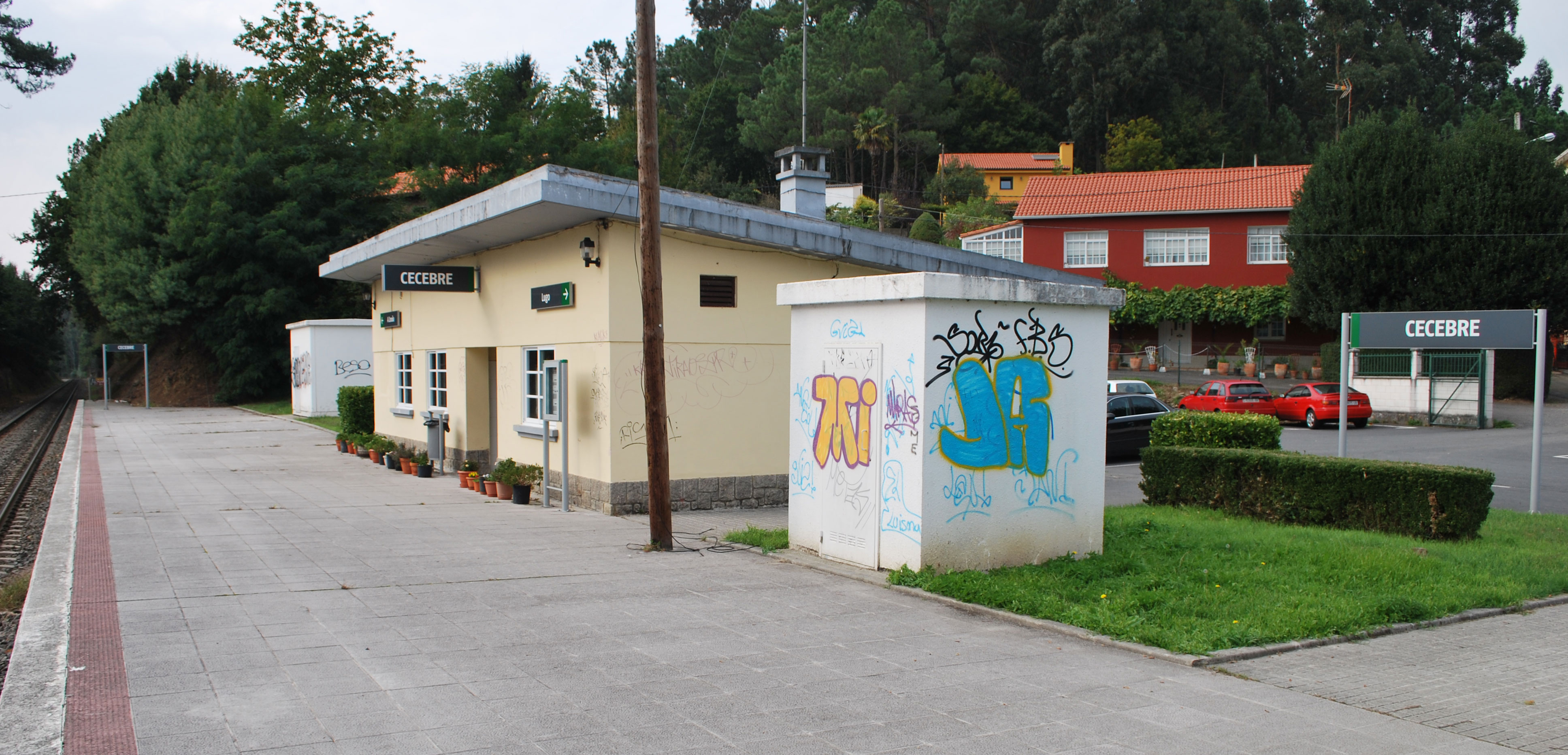 Apeadoiro de Cecebre en Cambre A Coruña Galiza